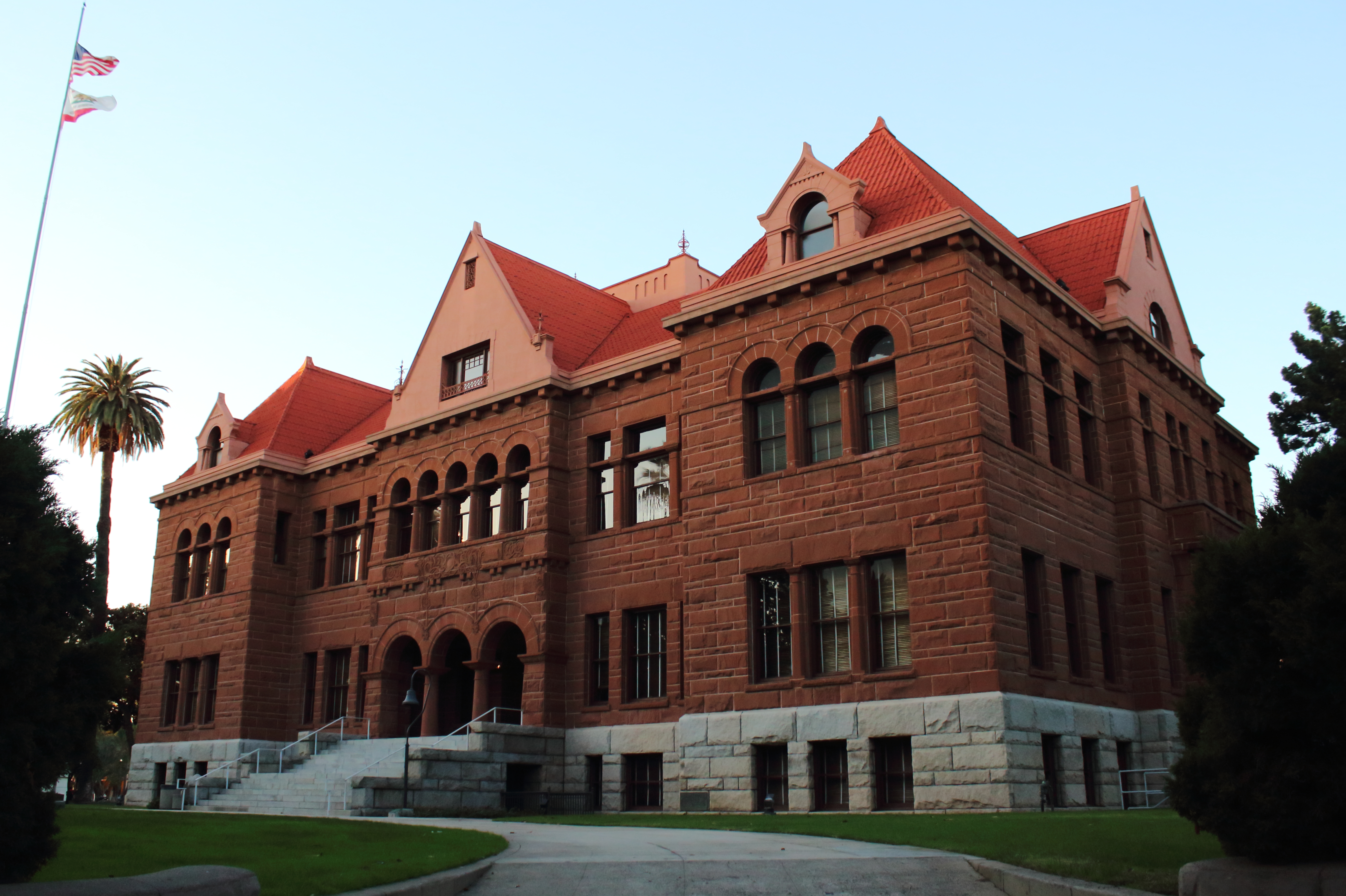 Old Courthouse de Santa Ana, Orange County, California.